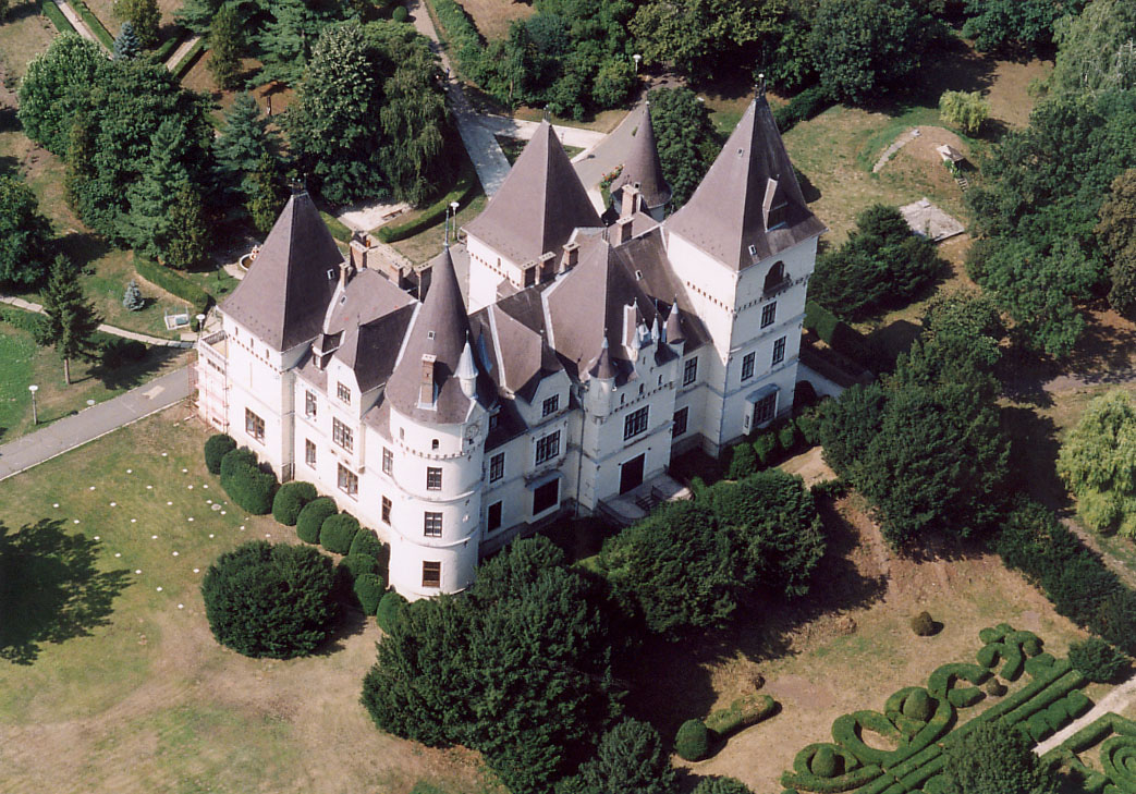 Palace - Tiszadob - Hungary - Europe